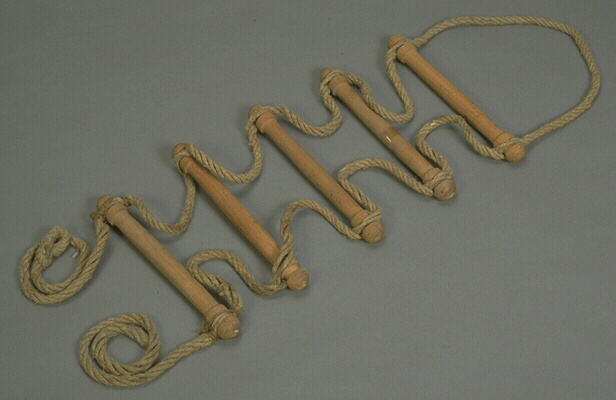 Échelle dont les montants latéraux sont constitués d'une corde maintenant à l'horizontale cinq barreaux en bois de section circulaire.